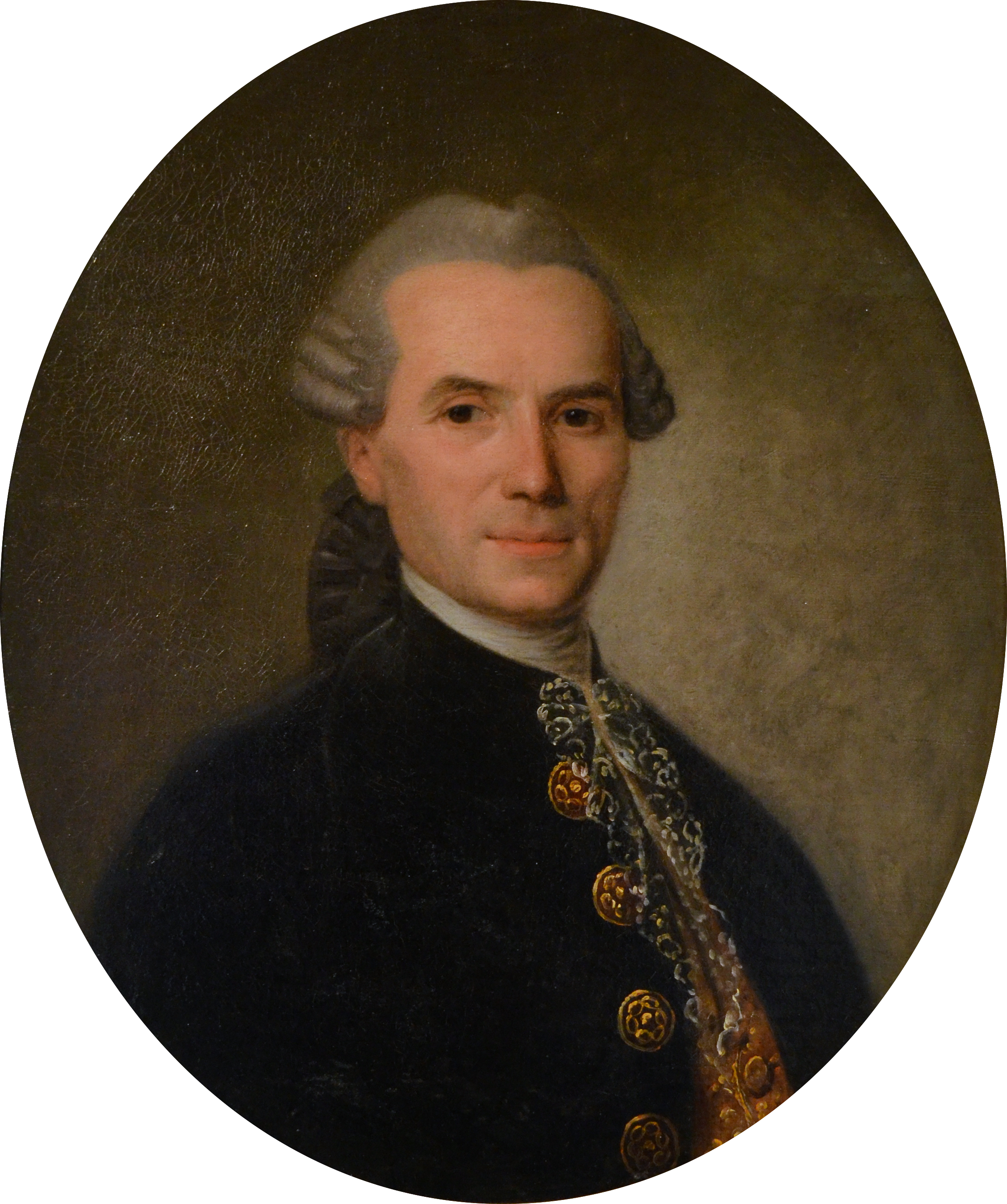 Portrait de Jean-Joseph-Louis Graslin non attribué (début 18ème siècle) - Musée d'histoire de Nantes